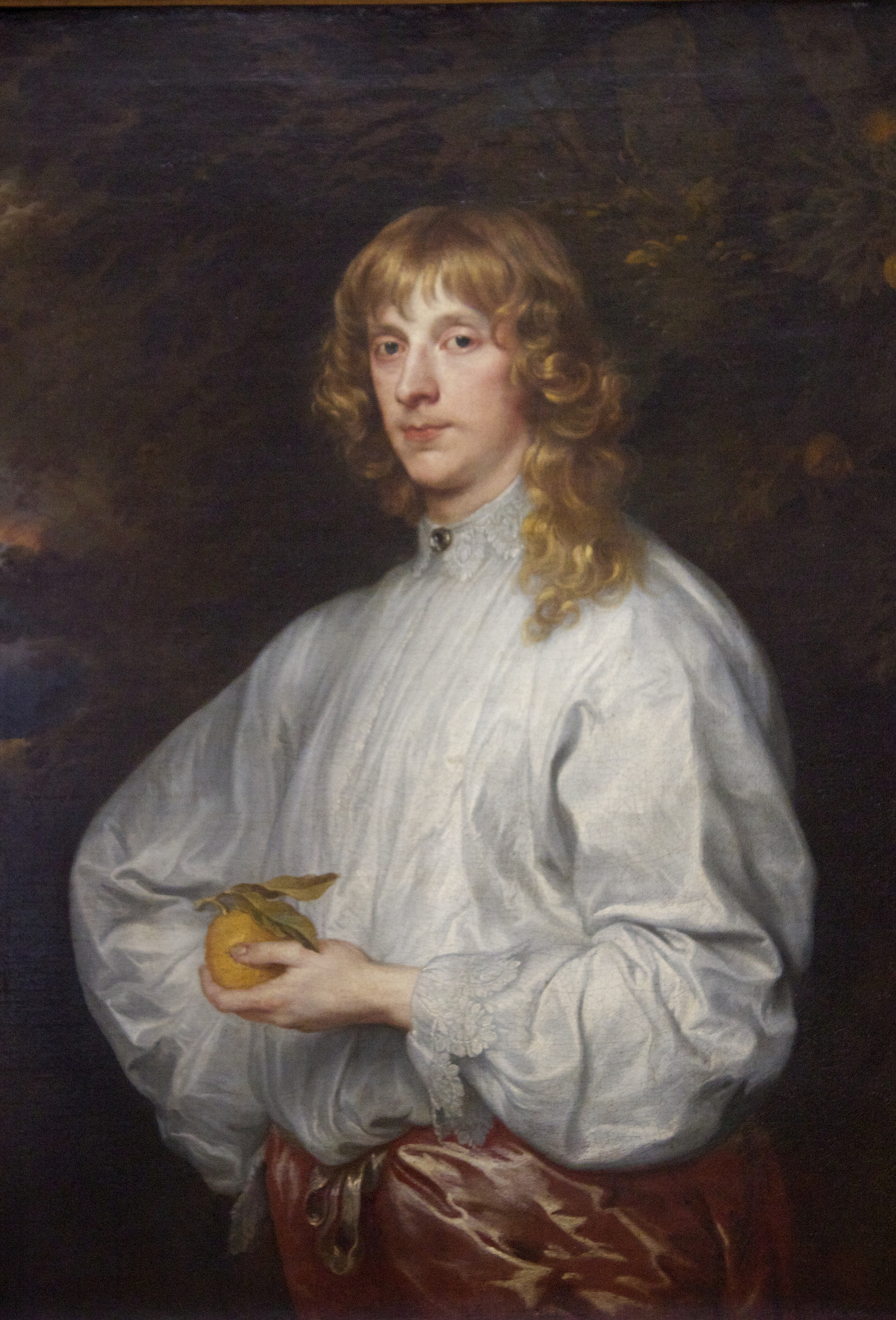 Anton van Dyck, James Stuart, duque de Richmond y de Lennox. Museo del Louvre.